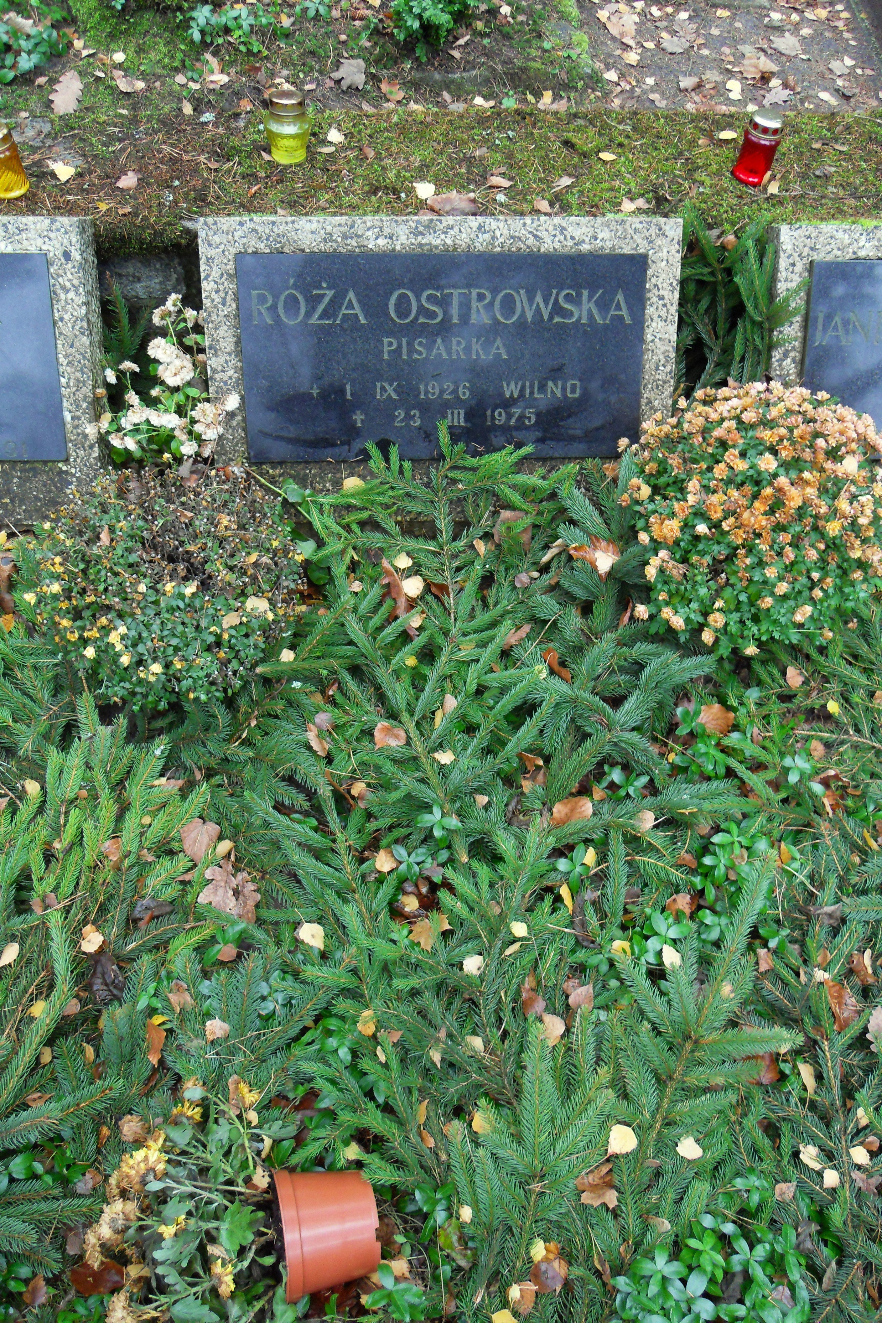 Gdańsk Wrzeszcz. Cmentarz Srebrzysko, grób Róża Ostrowska.